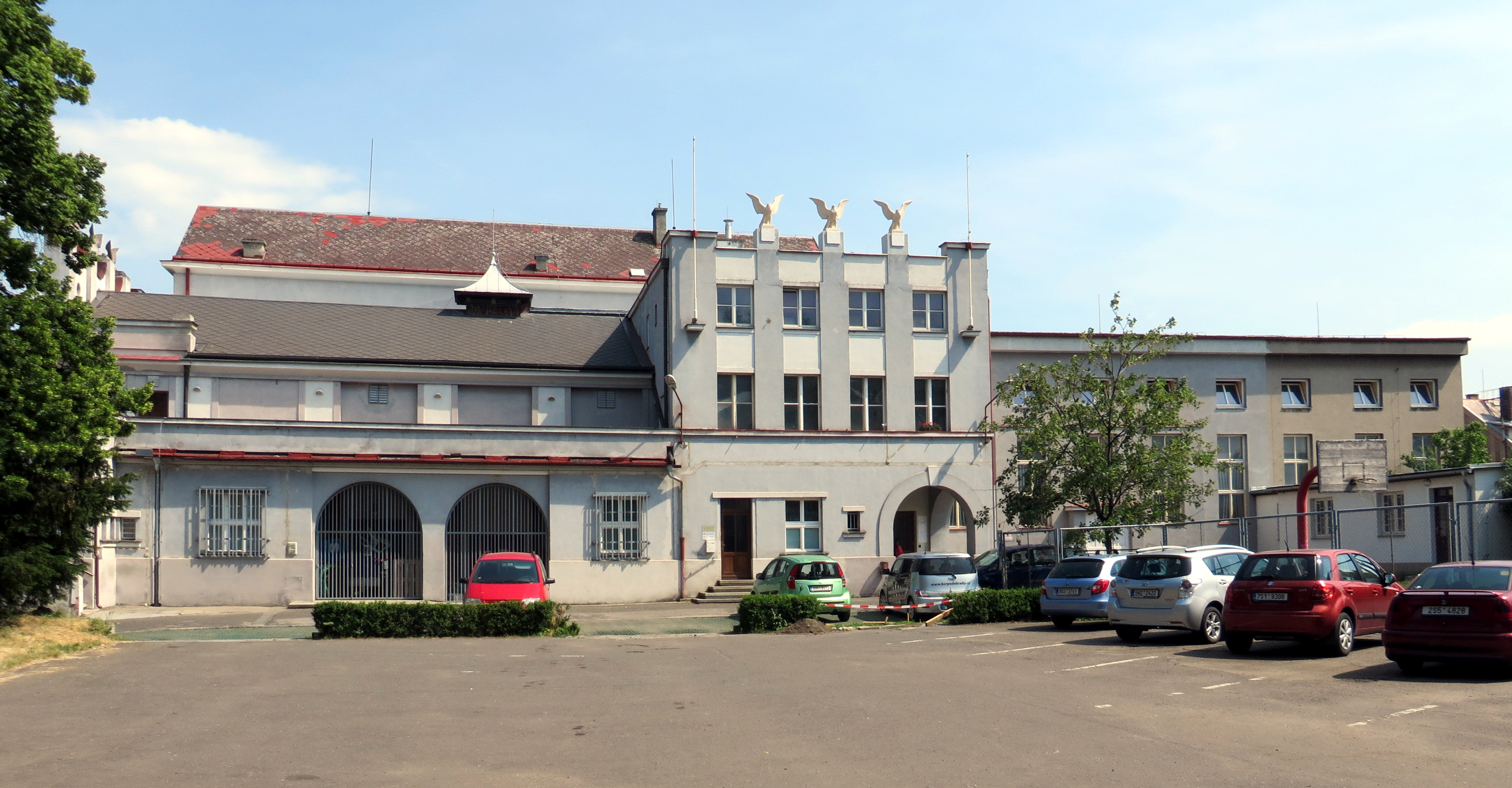 Sokolovna v Poděbradech.